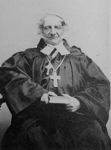 Järva-Jaani koguduse õpetaja ja Järva praost Ferdinand von Gebhardt (1832–1902)